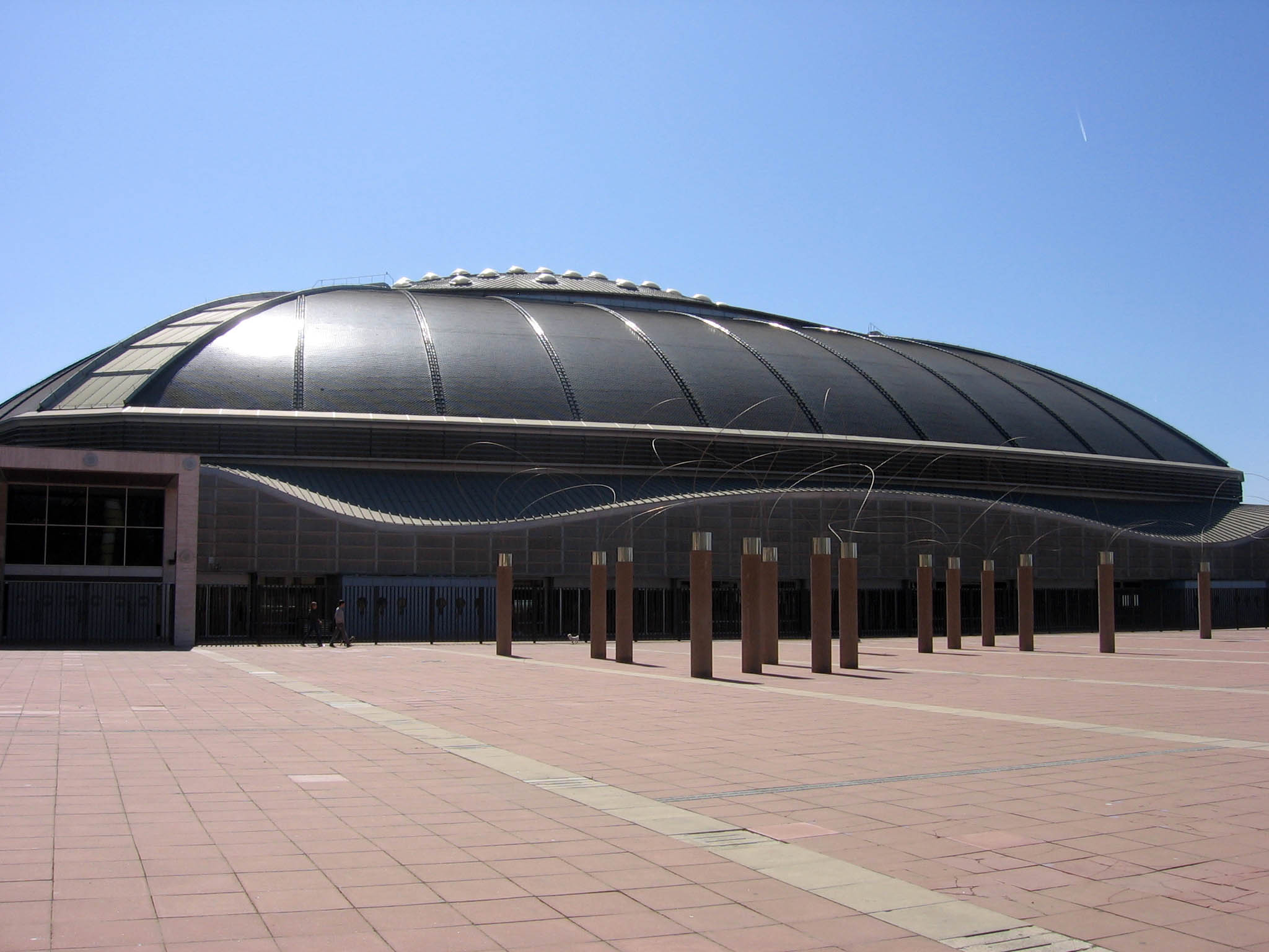 Palau Sant Jordi.